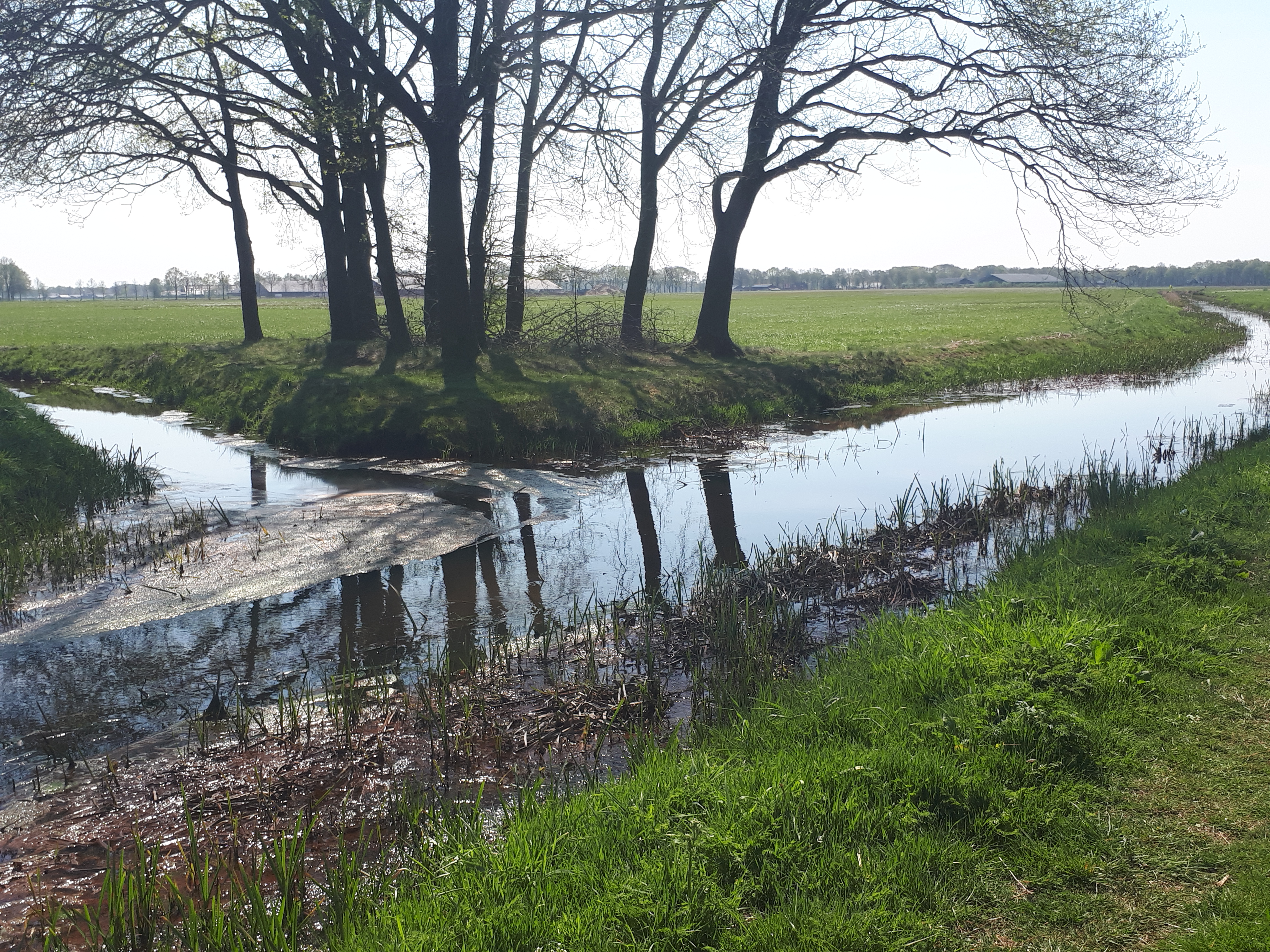 Het Dalems Stroompje (L) en de Aa of Goorloop (R) komen samen, en vormen samen de Groote Beerze.